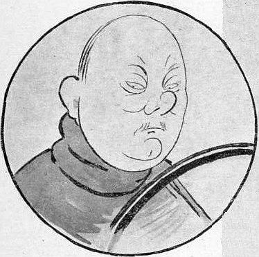 Caricature de René Thomas, après l'Indy 500 de 1919.